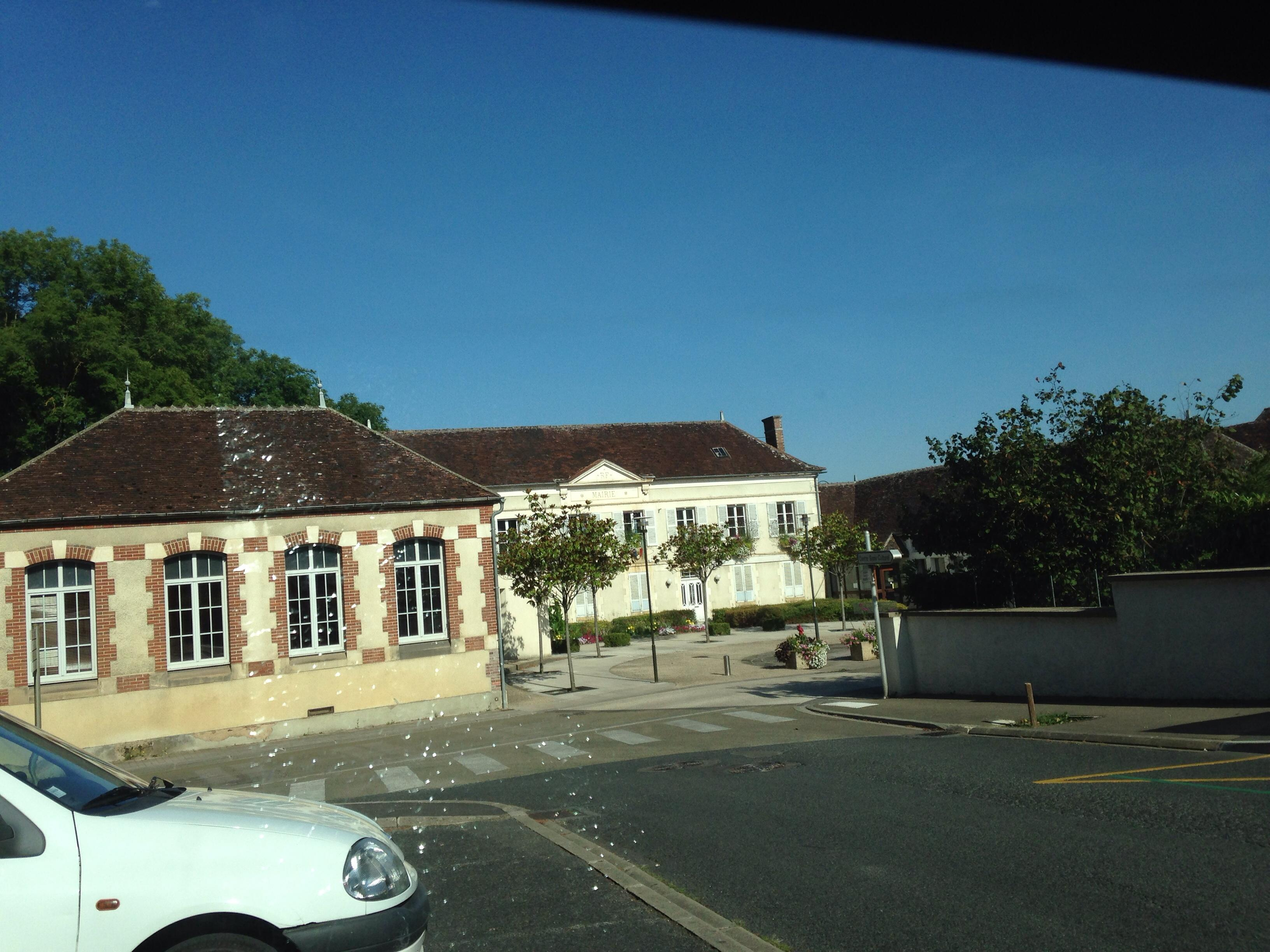 Mairie de saint Georges sur baulche